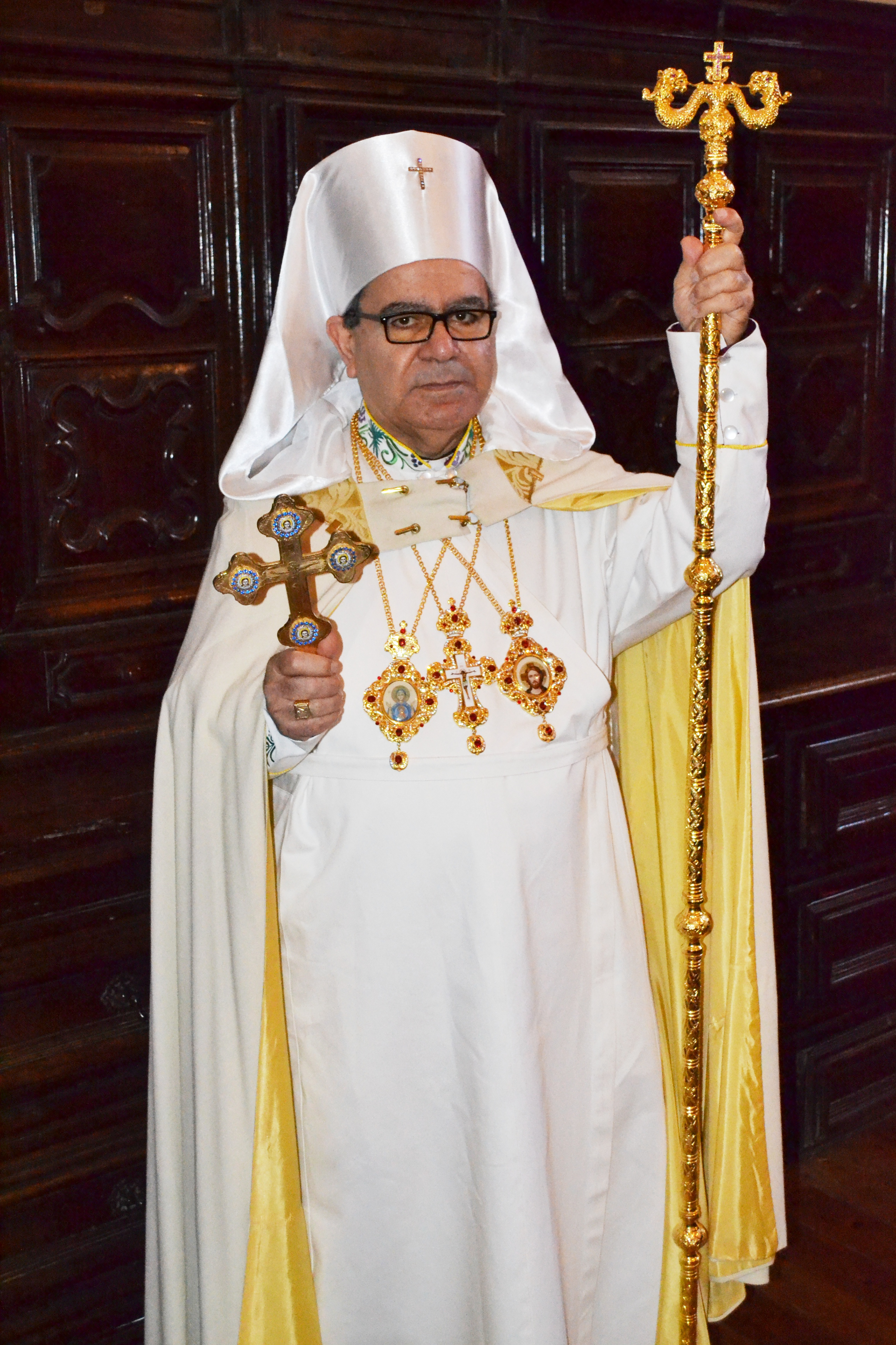 Benjamin Ier Abboud, ou Jean Abboud1 (né en 1960) est le patriarche de l’Église de l’Unité